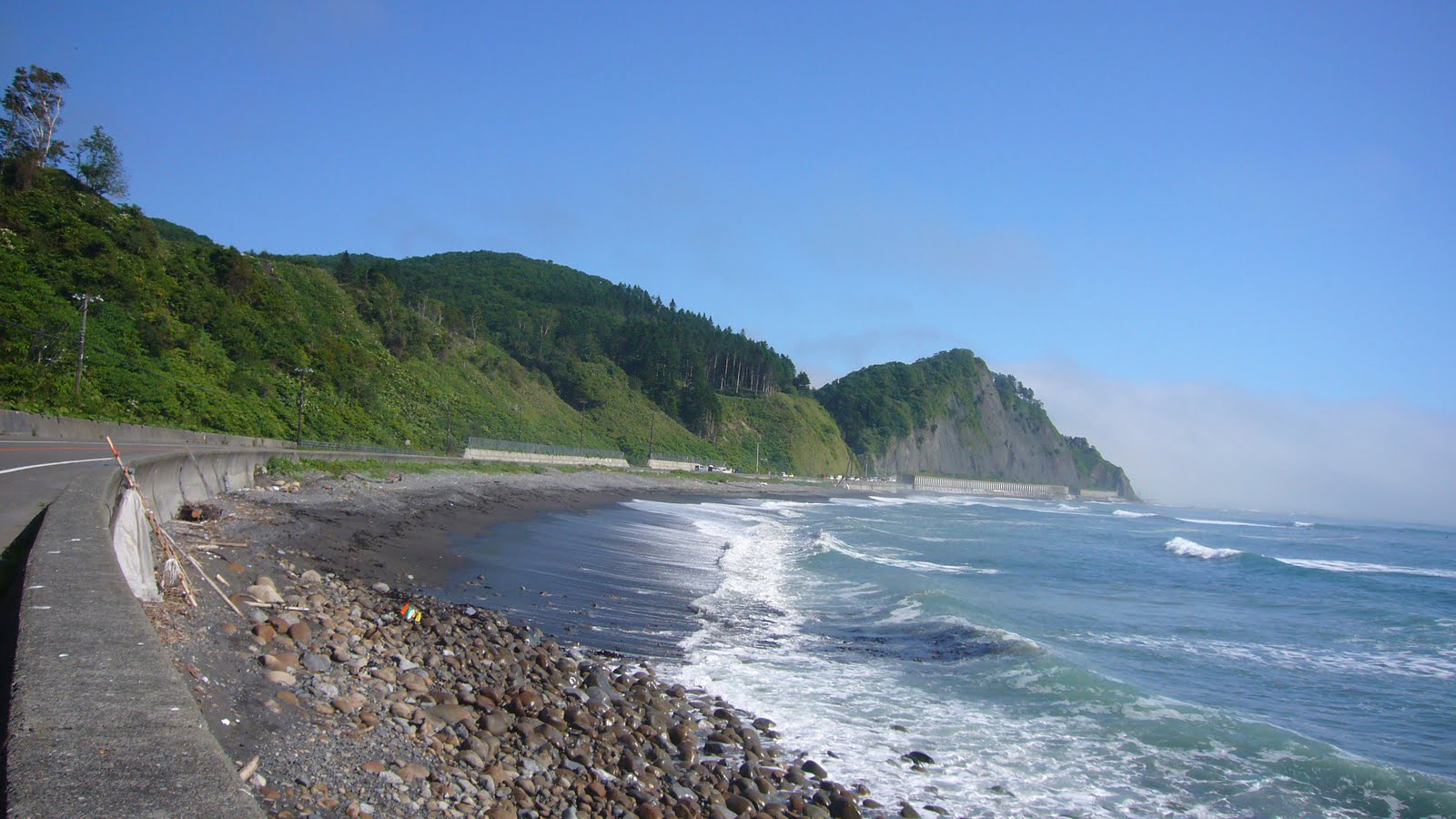 黄金道路